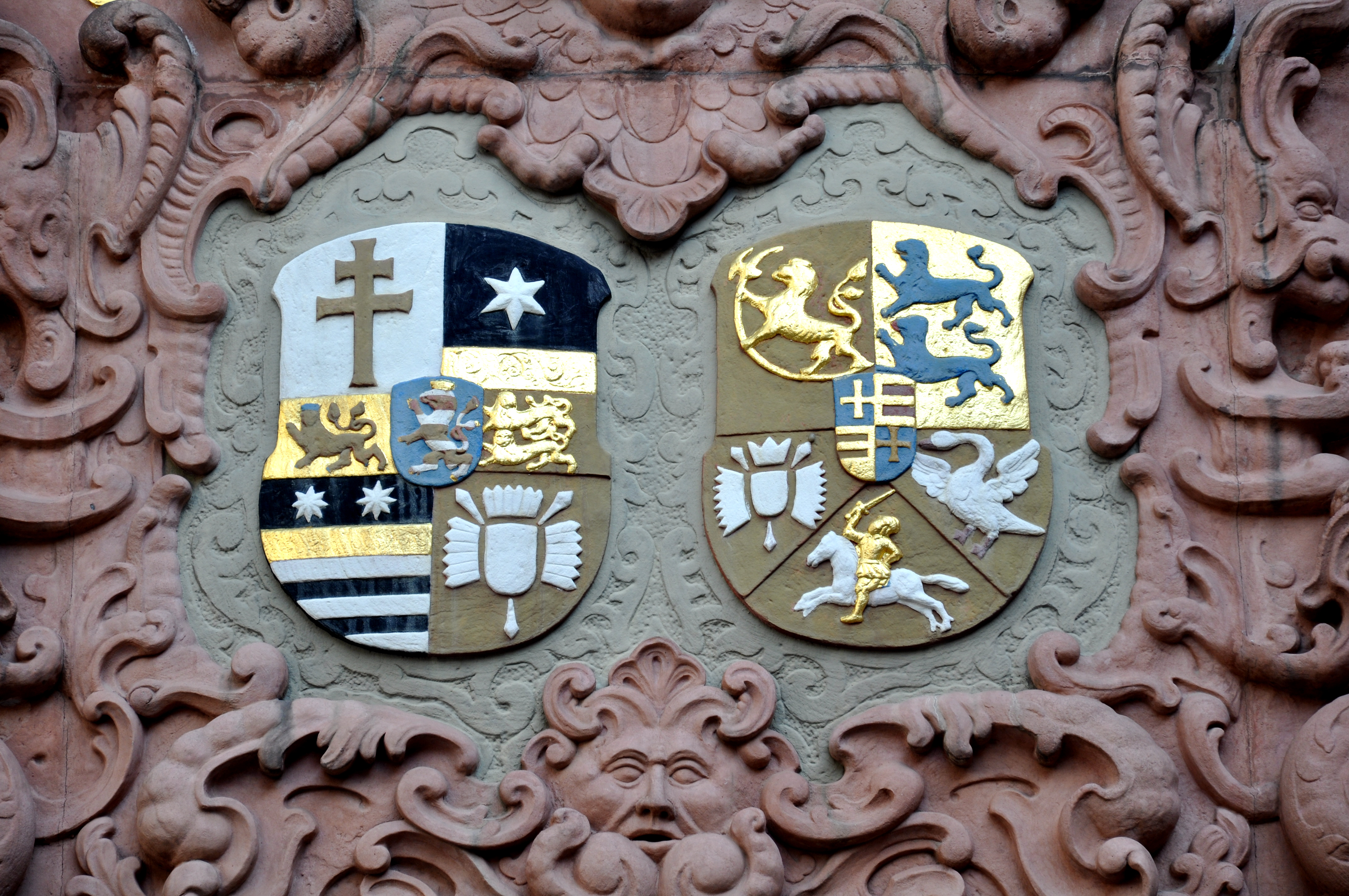 Darmstadt, Residenzschloss, Glockenbau, Wappenrelief am Portal (Details siehe auch [1]), Allianzwappen Ludwig VI. von Hessen-Darmstadt (1630–1678) und Maria Elisabeth von Schleswig-Holstein-Gottorp (1634–1665)